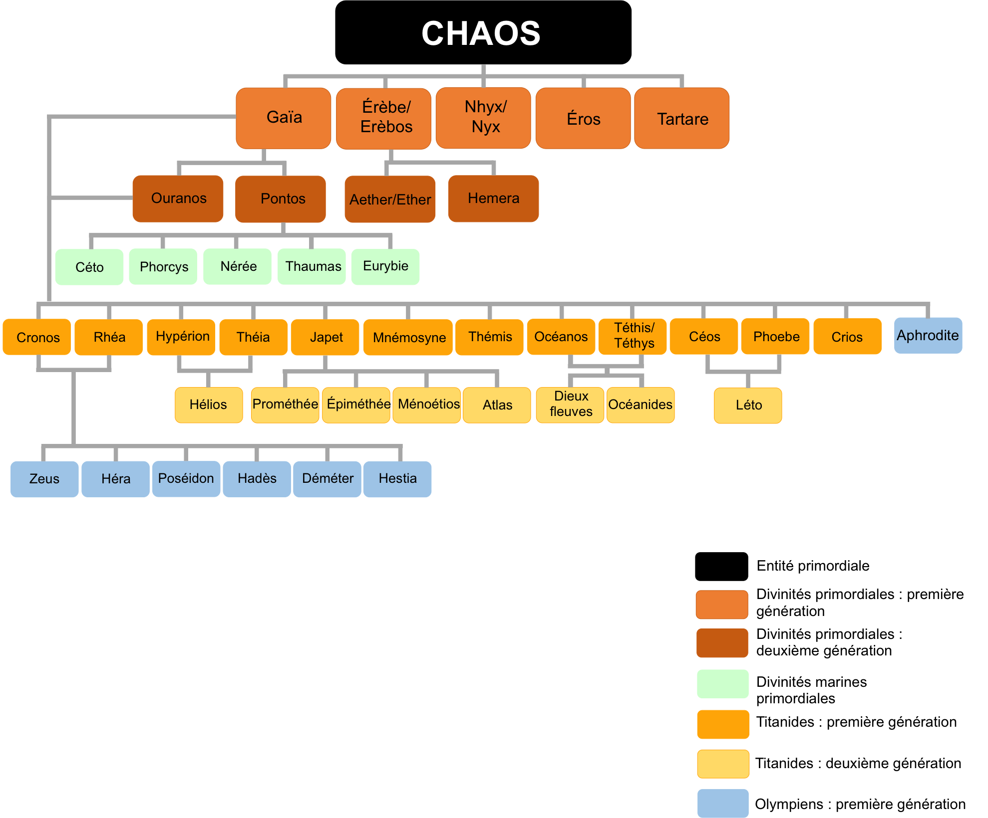 Généalogie réalisée à partir des sources les plus fiables de l'Antiquité grecque